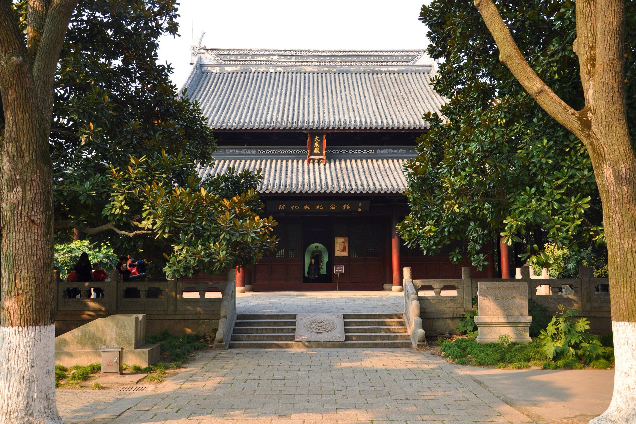 孔庙大成殿 友谊路1号